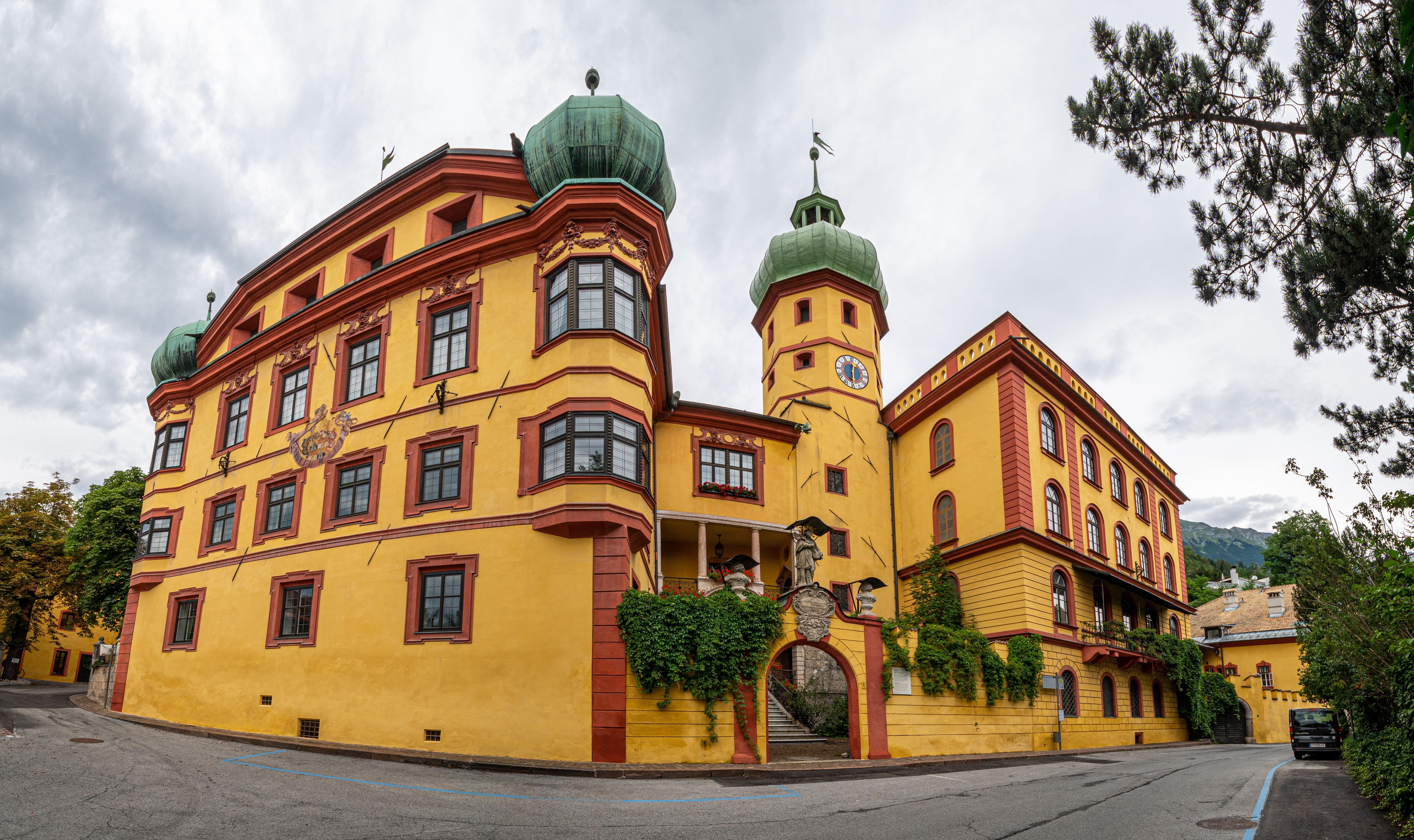 Schloss Büchsenhausen in Innsbruck (2019) This media shows the remarkable cultural object in the Austrian state of Tyrol listed by the Tyrolean Art Cadastre with the ID 28760. (on tirisMaps, pdf, more images on Commons)